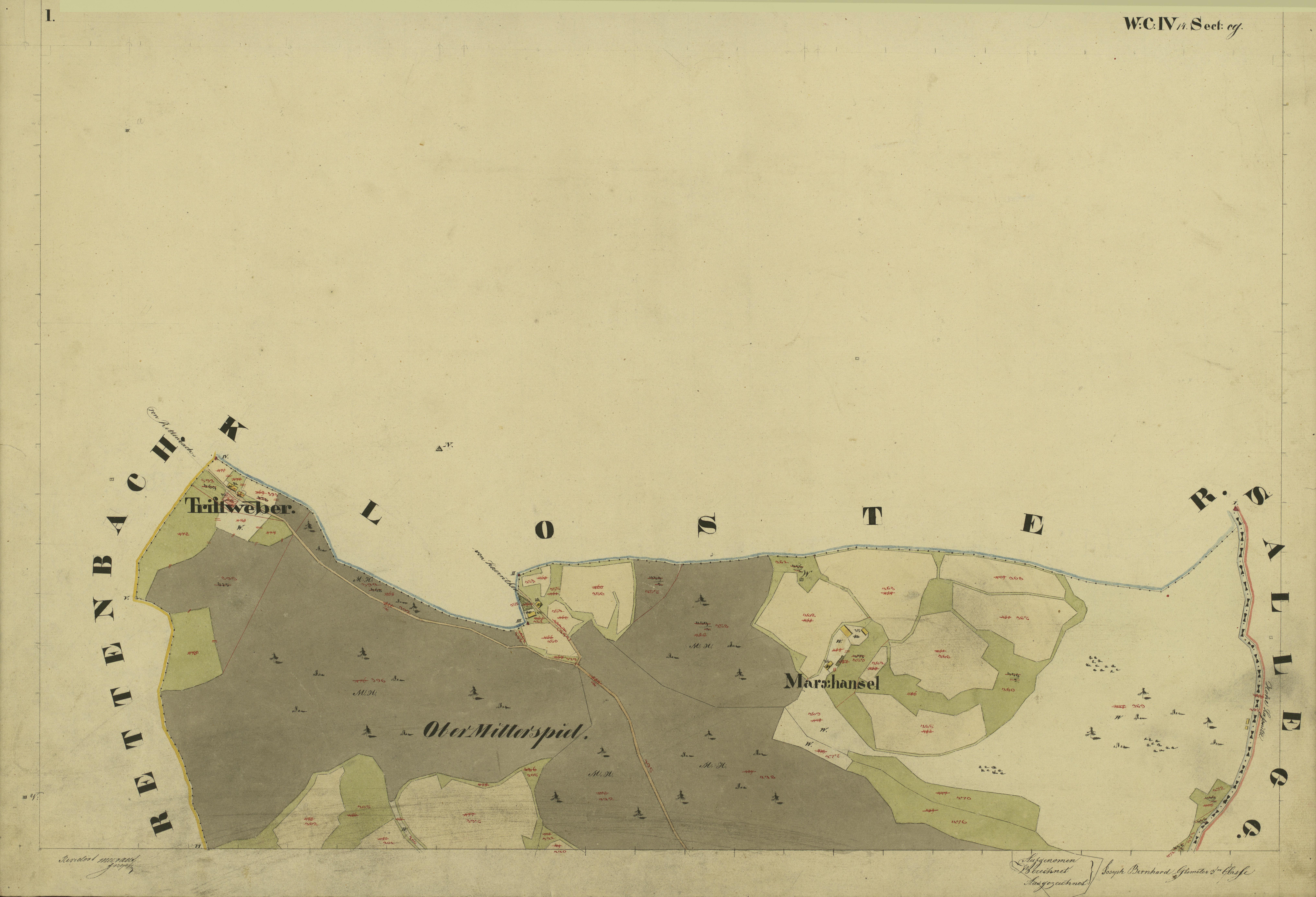 historische Vermessungskarte: österreichischer Kataster, Gemeinde Mitterspiel. 1825. Blatt I mit der Grenze vor der Veränderung 1891.